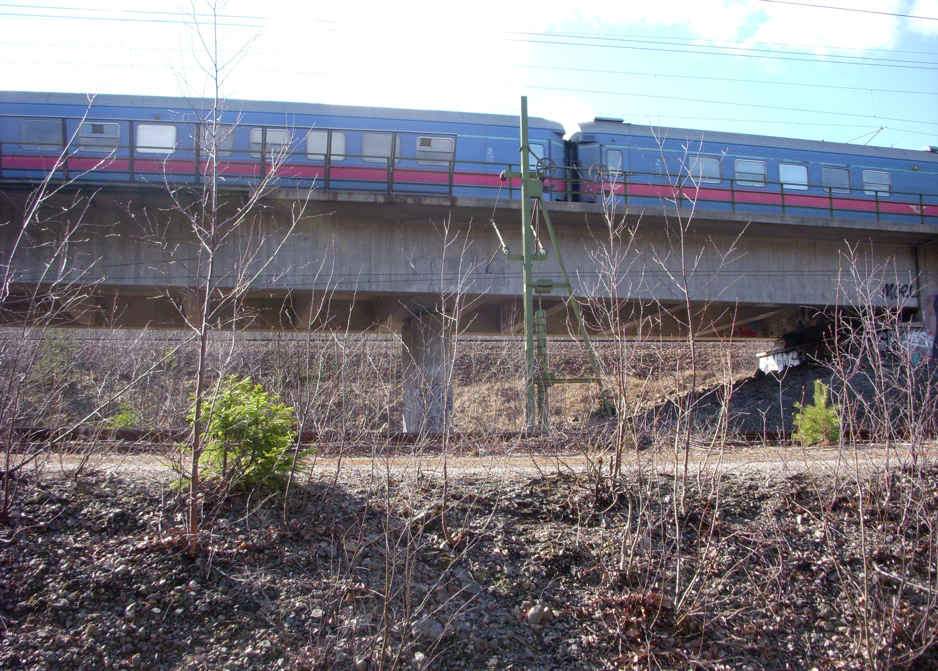 Älvsjöskogen stambanans viadukt